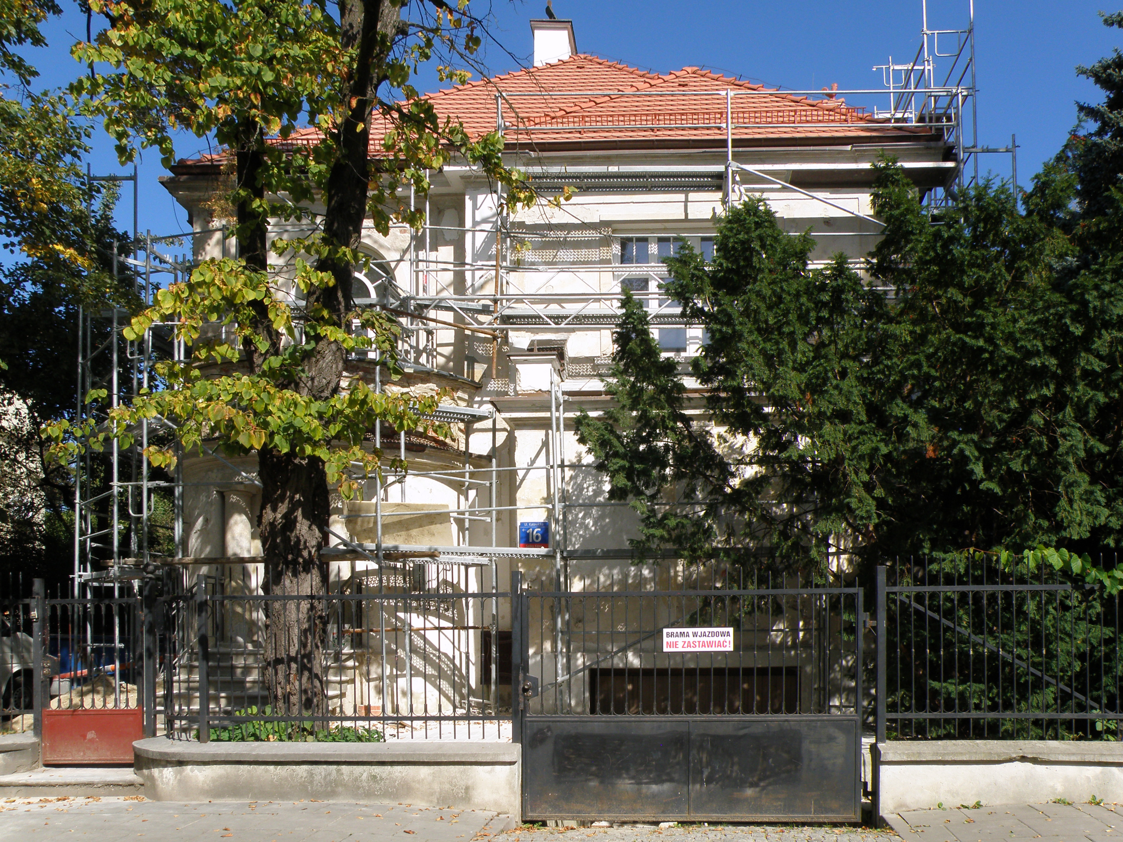 Dom, 1920-30, ul. Katowicka 16 (953-A z 13.06.1979), Warszawa.